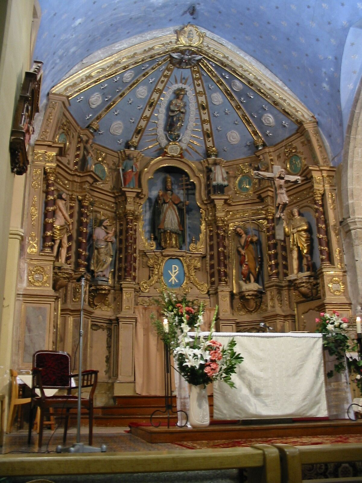 Eglise d'Osséja, Pyrénées-Orientales, France